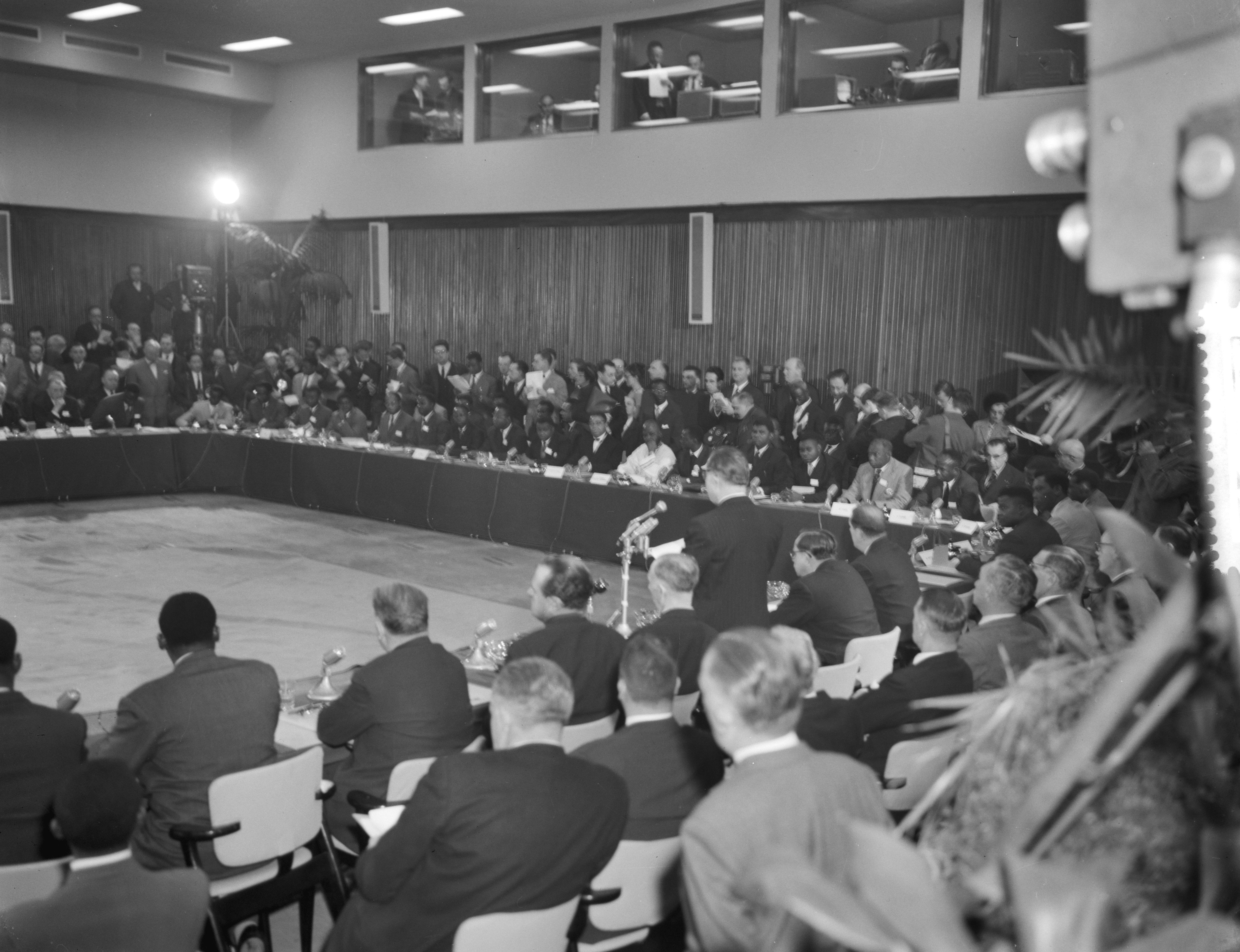 Collectie / Archief : Fotocollectie Anefo Reportage / Serie : [ onbekend ] Beschrijving : Ronde Tafel Conferentie te Brussel Congo Datum : 20 januari 1960 Locatie : Brussel Instellingsnaam : Ronde Tafel-Conferentie Fotograaf : Pot, Harry / Anefo Auteursrechthebbende : Nationaal Archief Materiaalsoort : Negatief (zwart/wit) Nummer archiefinventaris : bekijk toegang 2.24.01.04 Bestanddeelnummer : 910-9593